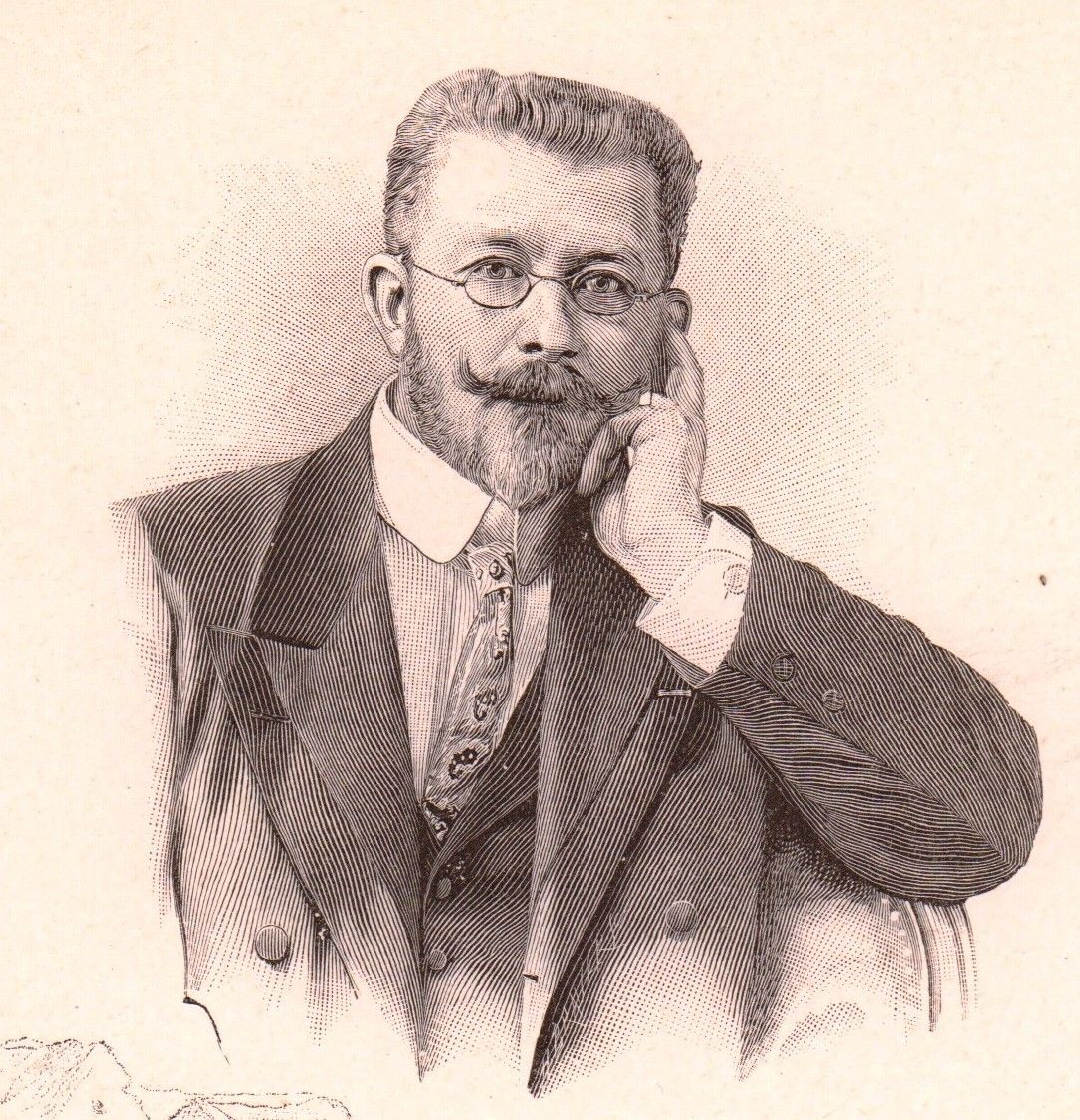 French painter Jules-Alexis Muenier (1863-1942)